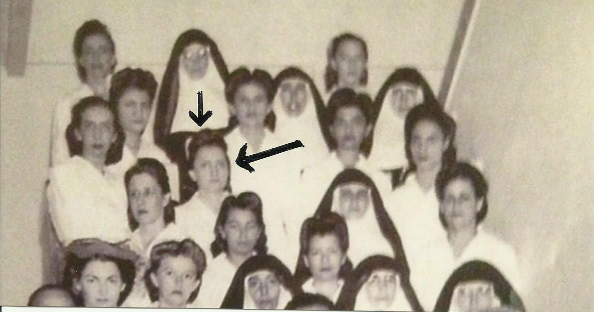 Aurora López Pérez entre un grupo de enferemeras y religiosas, del Hospital Central de Maracaibo, Estado Zulia, Venezuela.